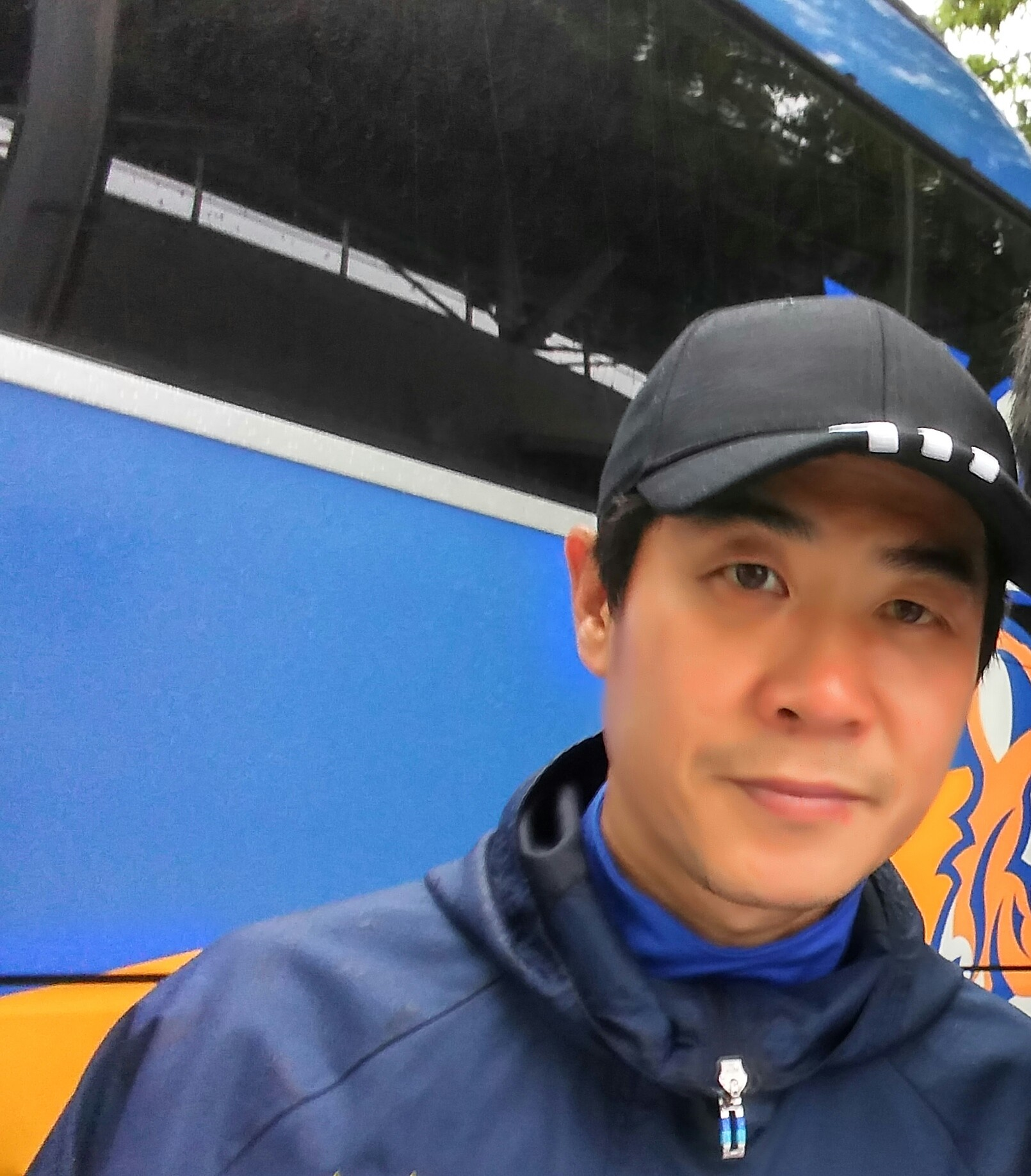 전 울산 감독 윤정환